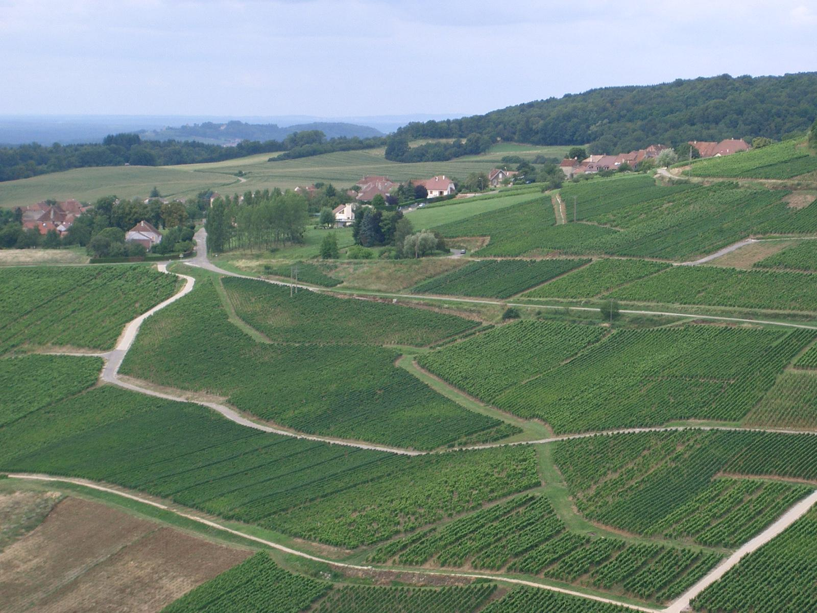 village de Menétru-le-vignoble depuis Château-Chalon dans le département du Jura (France) - A.O.C. Côtes du Jura et Château-Chalon